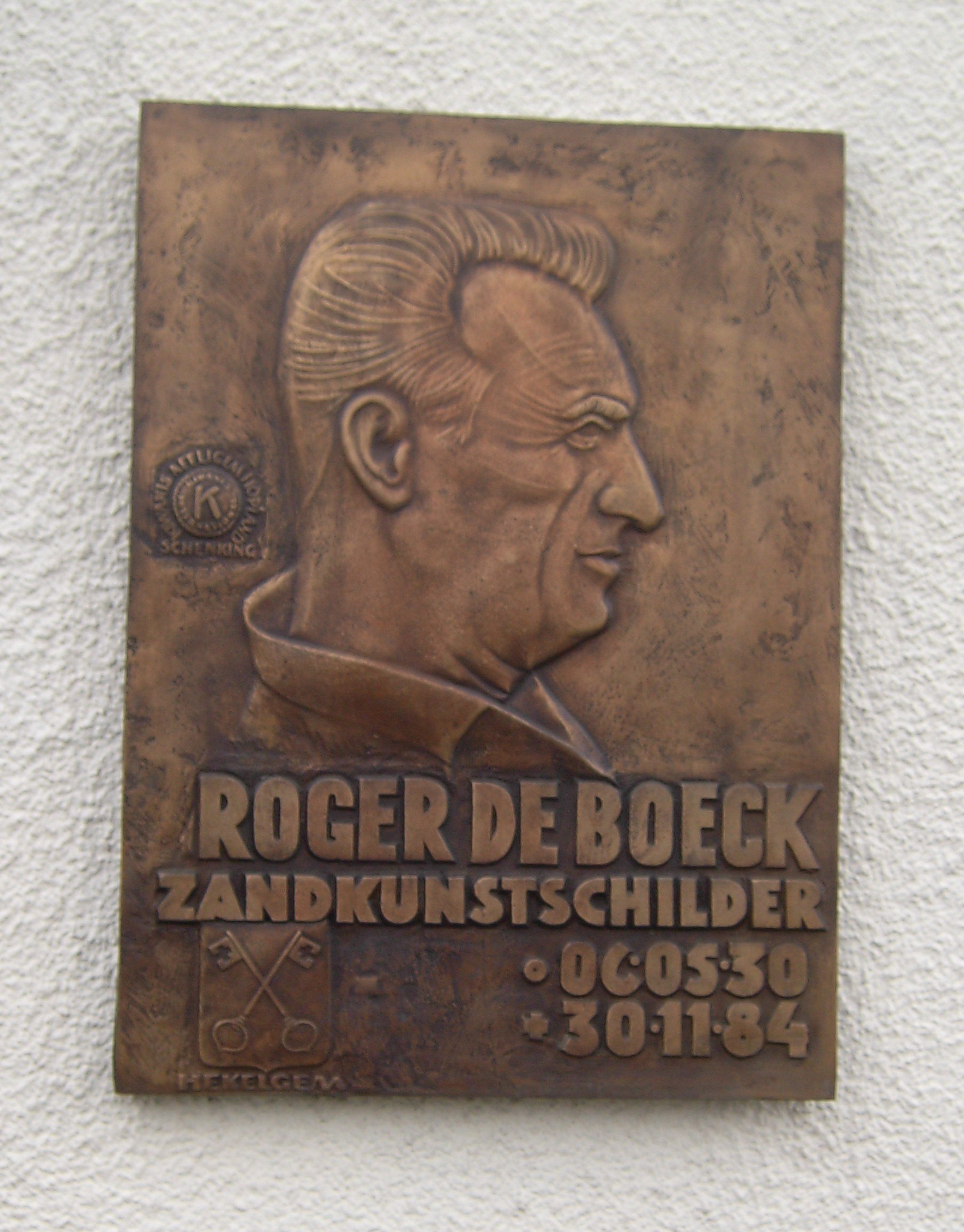 De Boeck Roger - zandkunstschilder